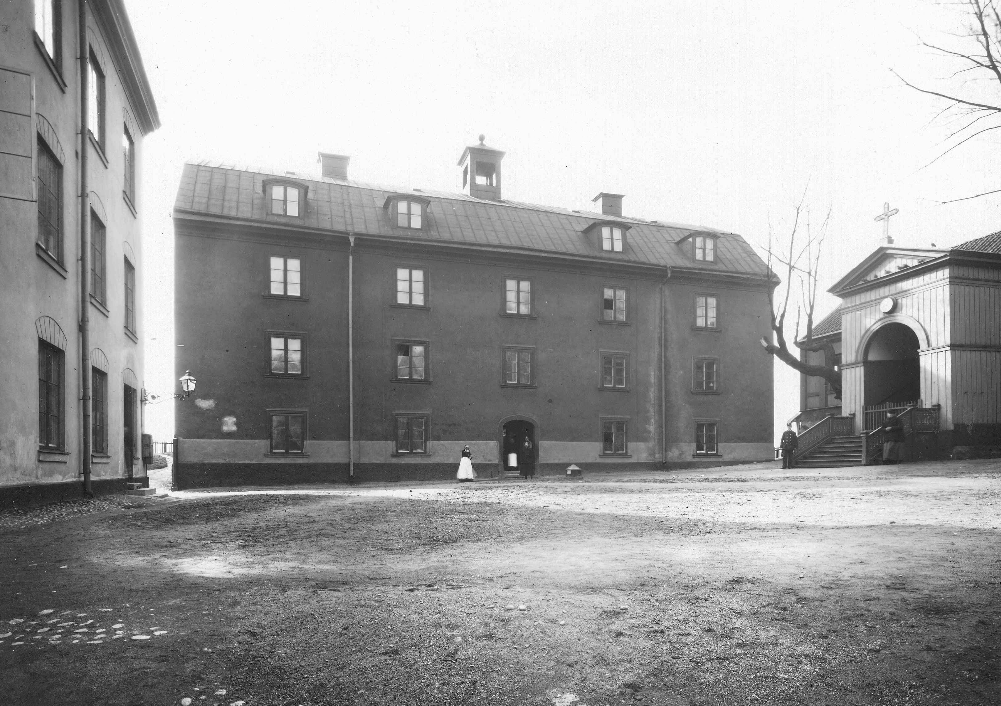 Nicolaihuset på Sabbatsberg (ålderdomshem), kyrkan till höger och Klarahuset till vänster